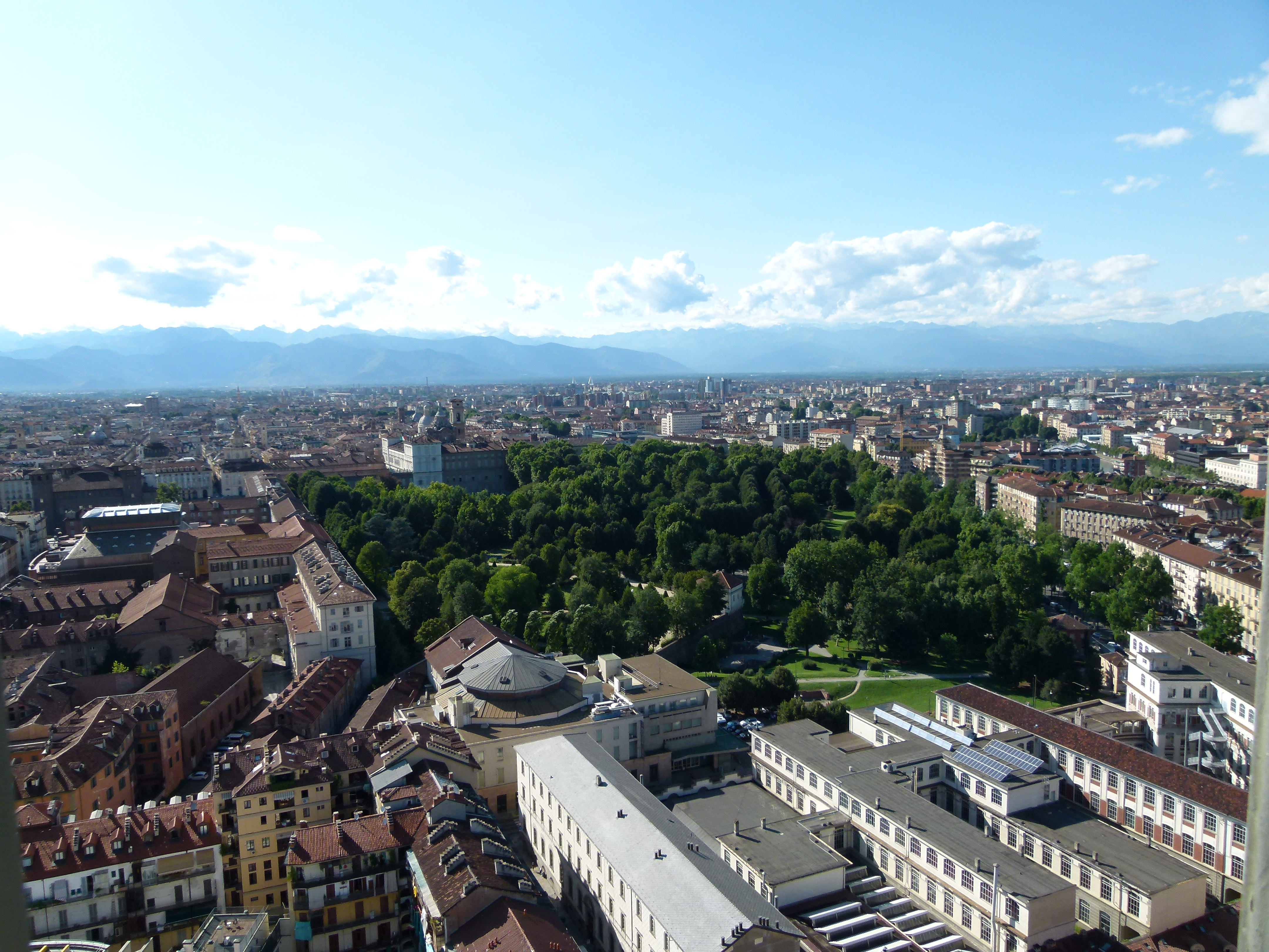 Nella foto da sinistra: Palazzo Madama (castello all'estrema sinistra), Palazzo Reale e Cupola e campanile del Duomo (sopra i giardini) e Giardini Reali.